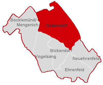 Lagekarte Ossendorf im Stadtbezirk Köln-Ehrenfeld